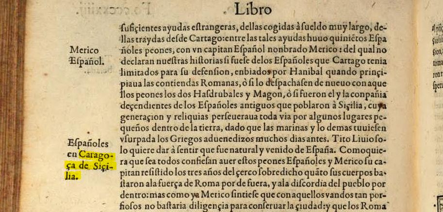 La storia siracusana delle cronache romane narrata da Florián de Ocampo, cronista spagnolo dell'imperatore (re di Spagna, re di Sicilia ecc...) Carlo V. A sinistra la scritta "Caragoca de Sicilia"; largo passo incentrato su Merico (spagnolo) e la notte della conquista romana della polisa aretusea.